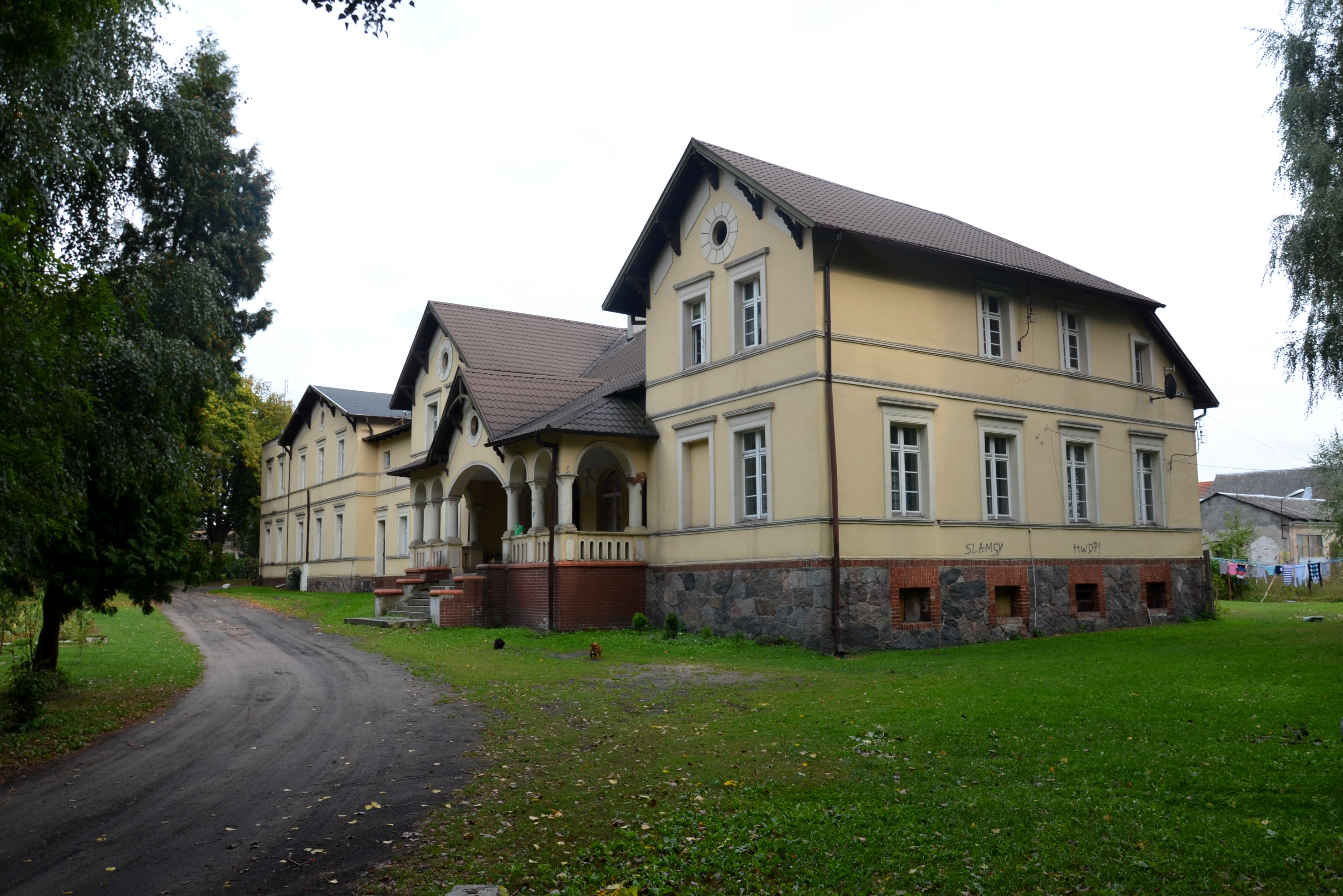 Ninino, pałac, 2 poł. XIX